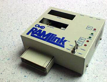 CMD Ramlink, see CMD_RAMLink